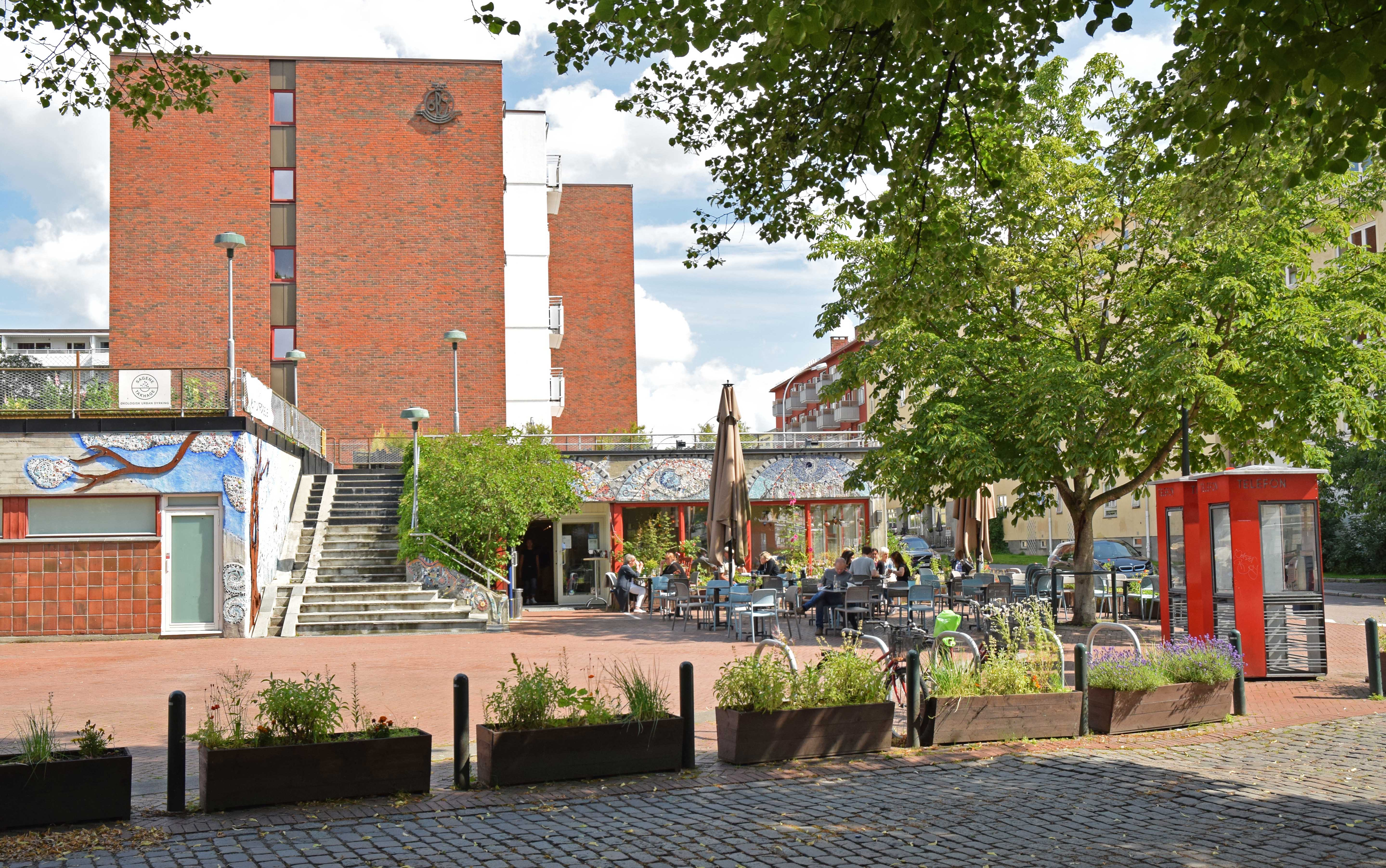 Arne Gjestis plass på Sagene i Oslo, sett fra parken Gråbeinsletta